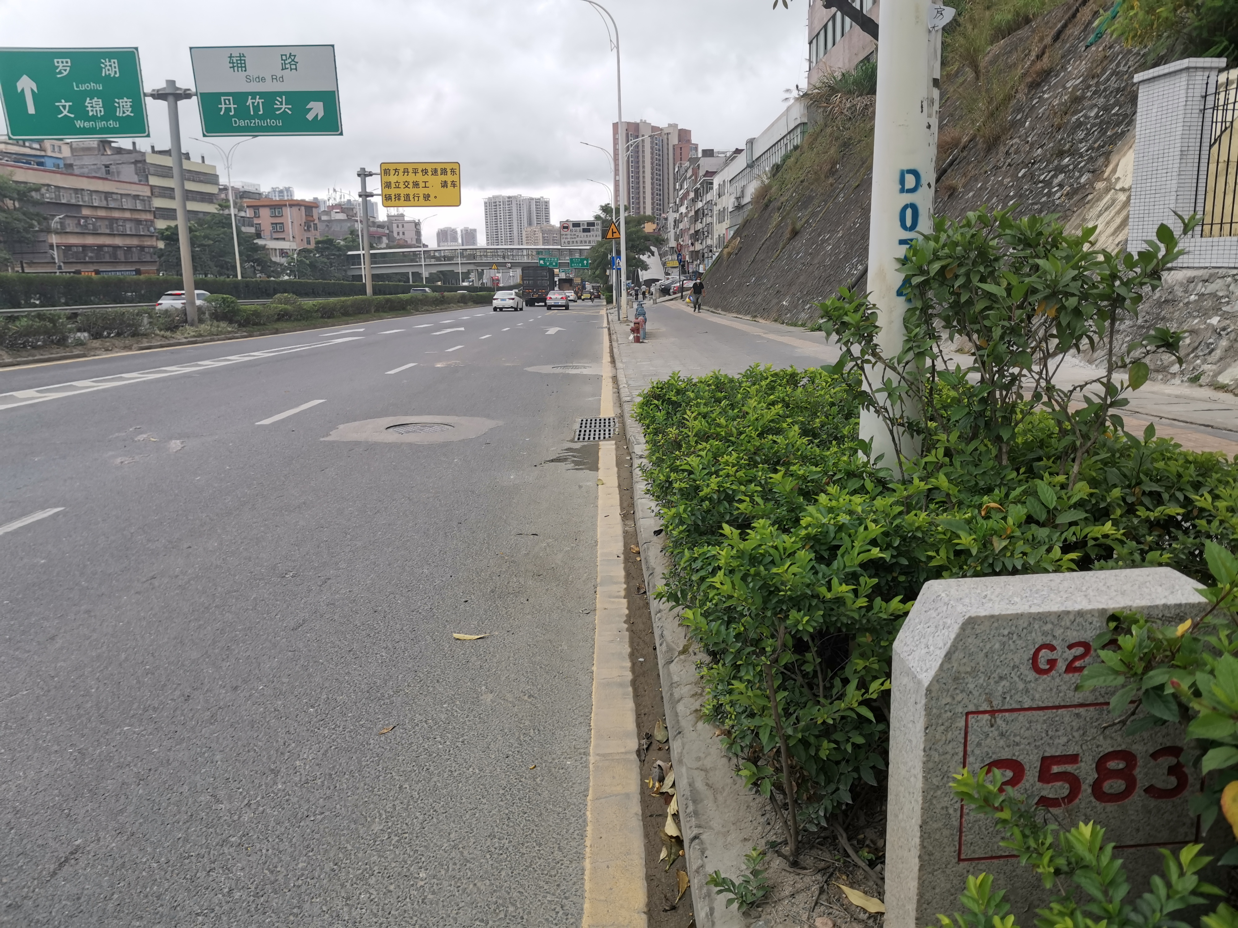 位于深圳 丹平路丹竹头段的220国道2583km里程碑（南向）